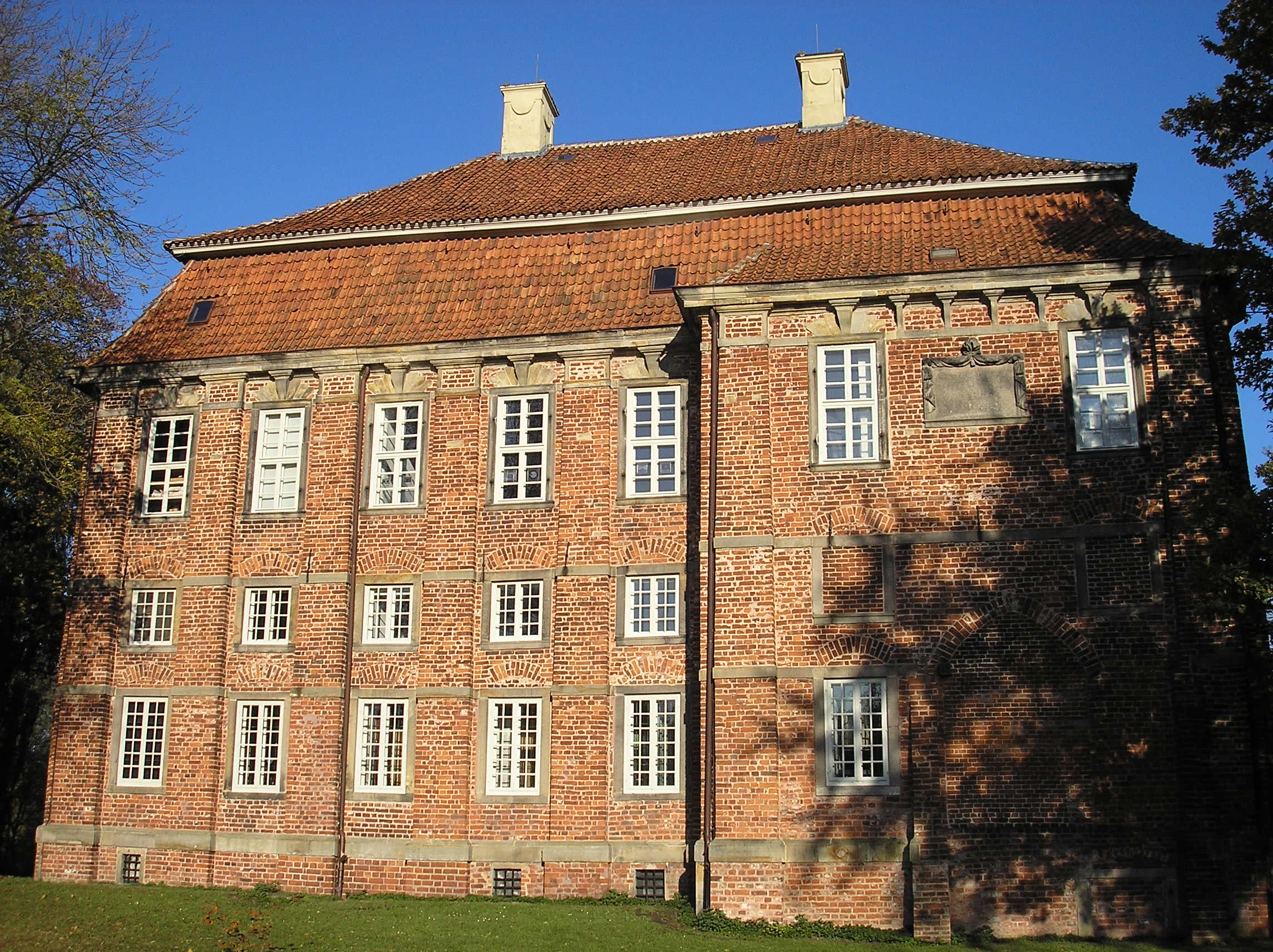 Ansicht der Schlosses Schönebeck in Bremen-Nord. Das abgebildete Objekt ist ein geschütztes Kulturdenkmal in der Freien Hansestadt Bremen, mit der Nr. 1285 beim Landesamt für Denkmalpflege registriert.